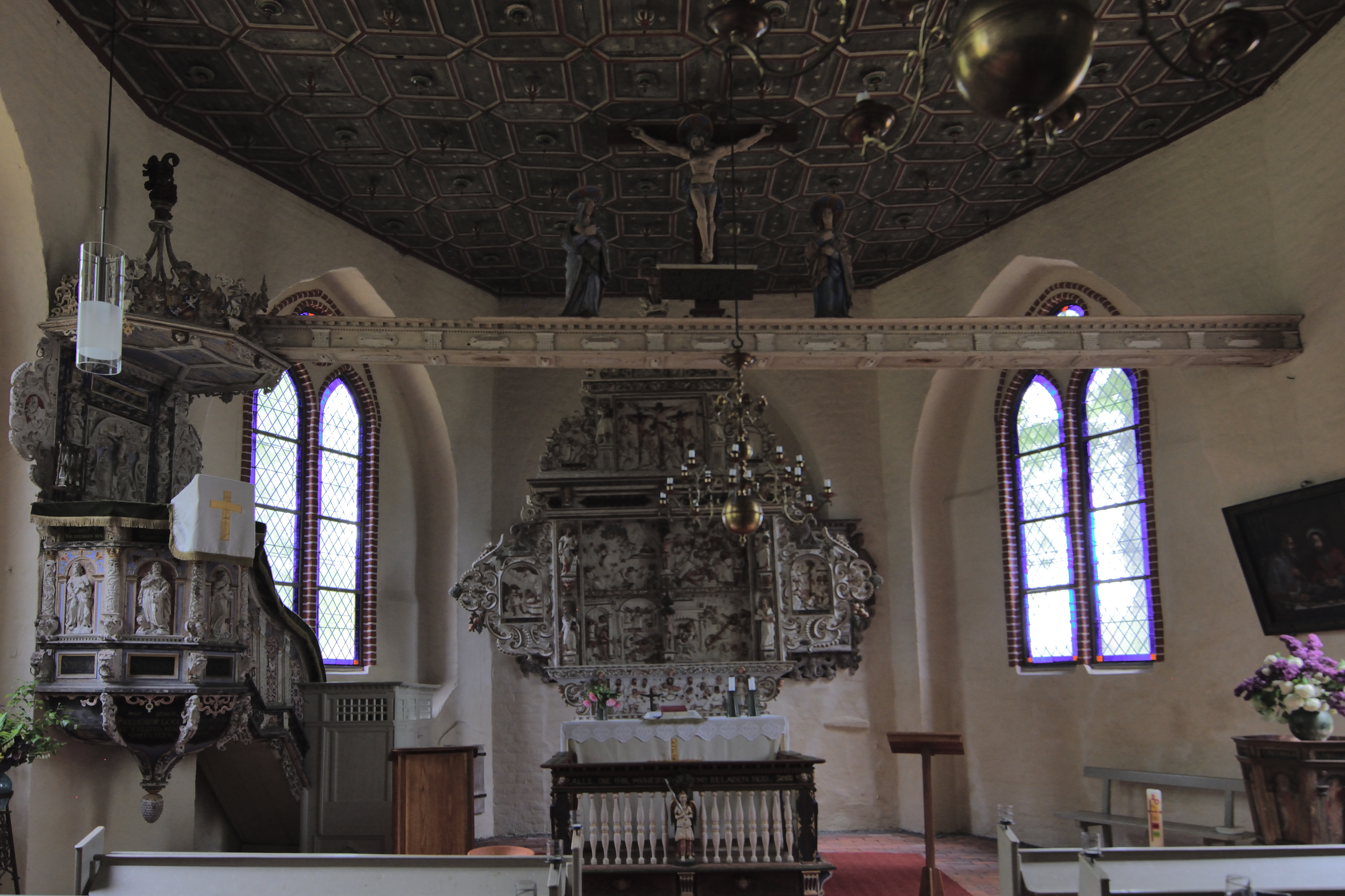 Dorfkirche in Dorf Mecklenburg, Chor